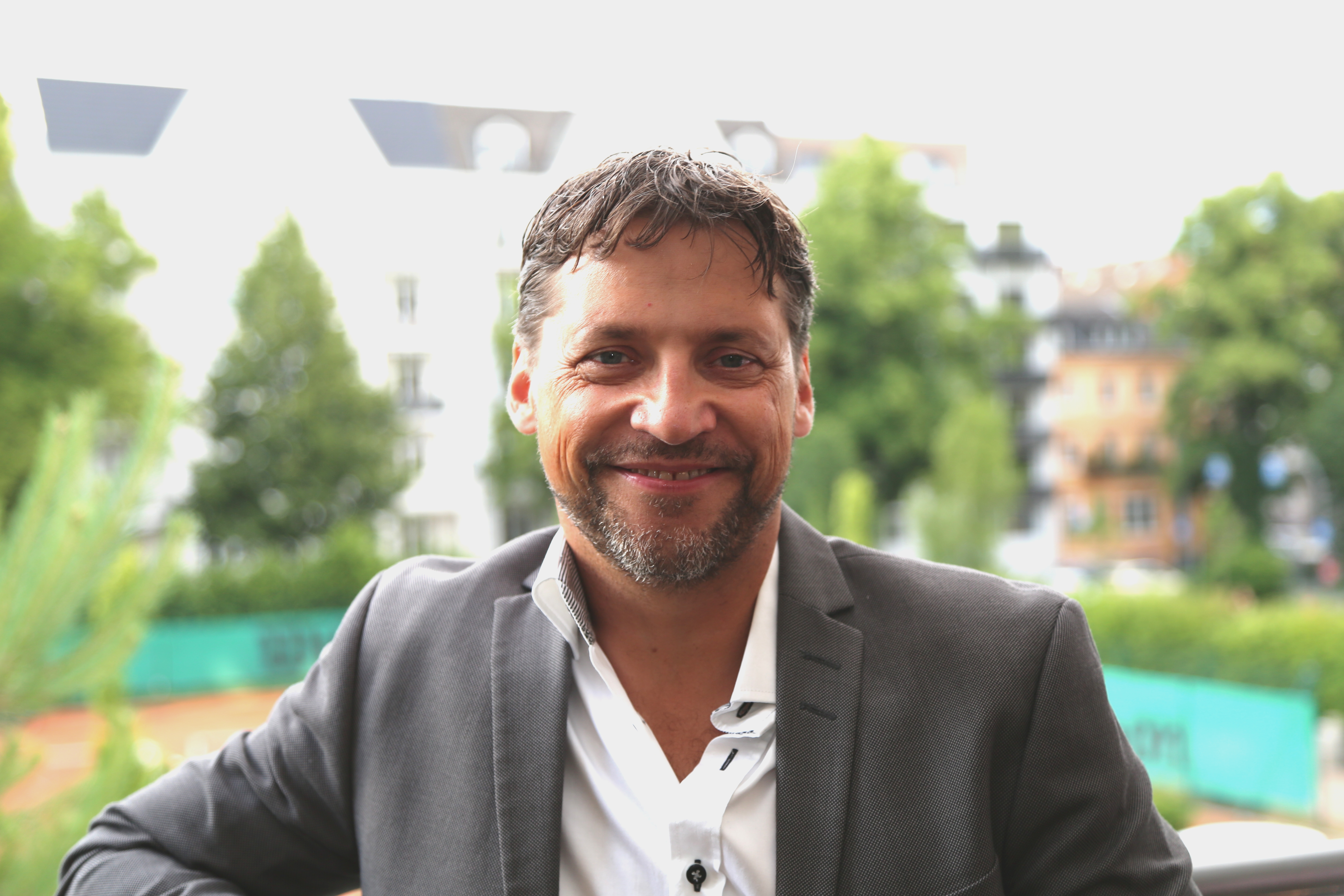 Patrick Bach bei der Aspria-Sommerparty 2017 am 17. Juni in Hamburg.